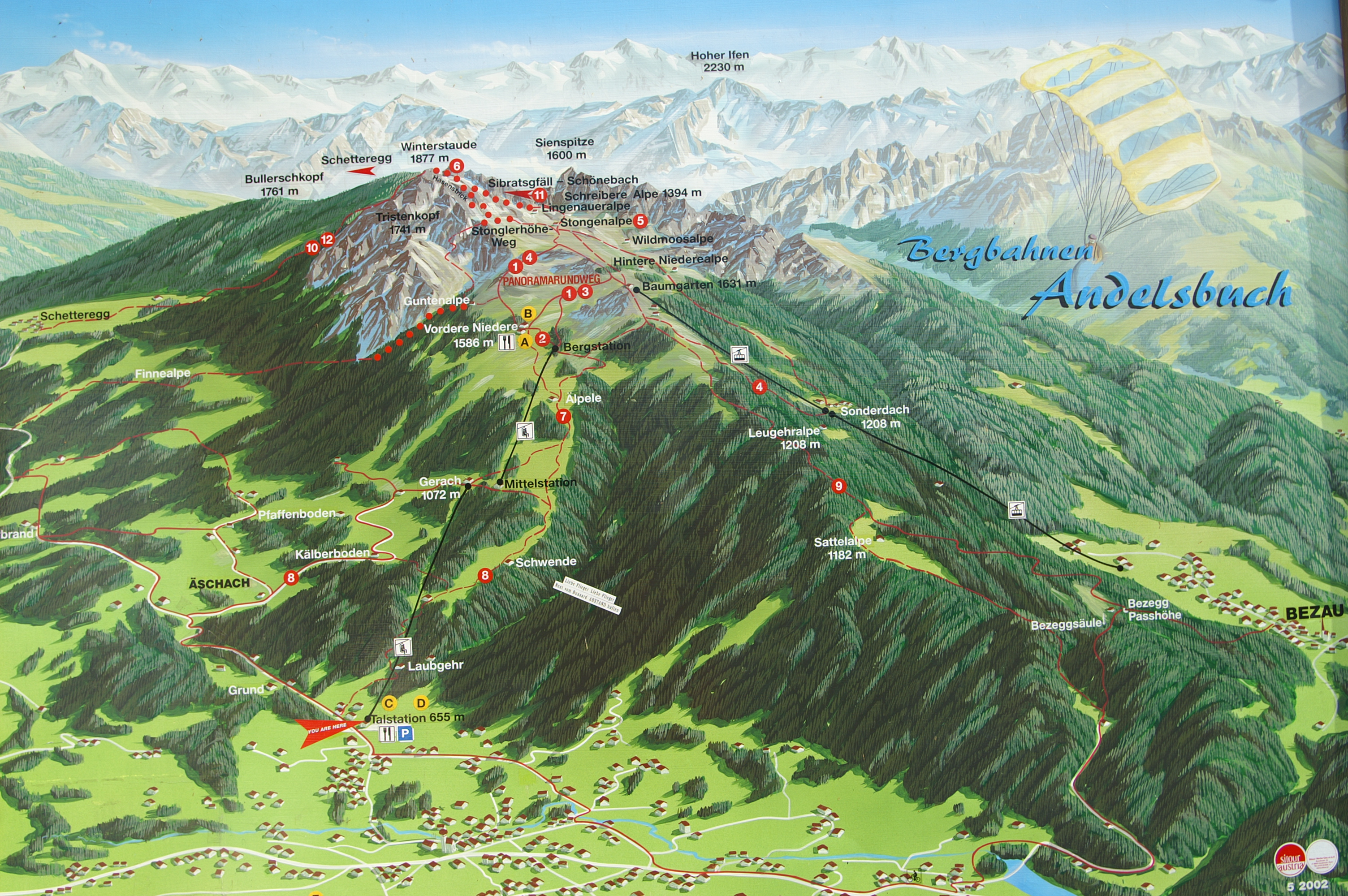 Paragliding auf der Niedere mit den Bergbahnen Andelsbuch in Vorarlberg